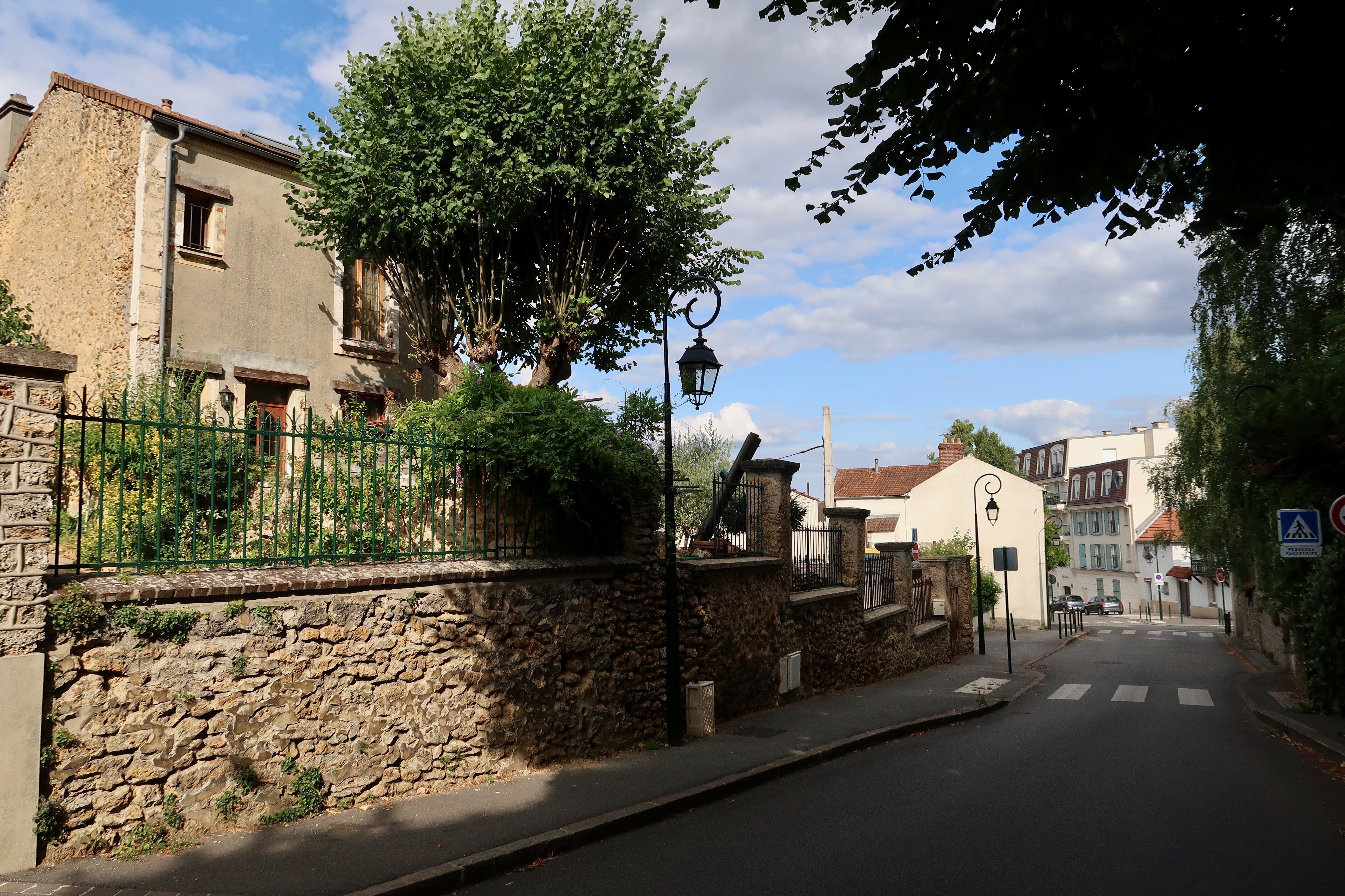 Maisons rue Henri-Prou, Les Clayes-sous-Bois (Yvelines).